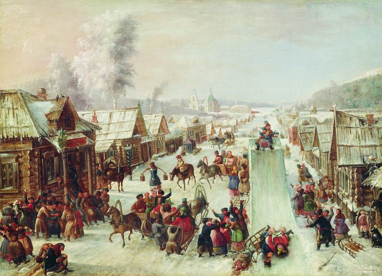 Л. И. Соломаткин. Масленица (Ну и масленица!). 1878